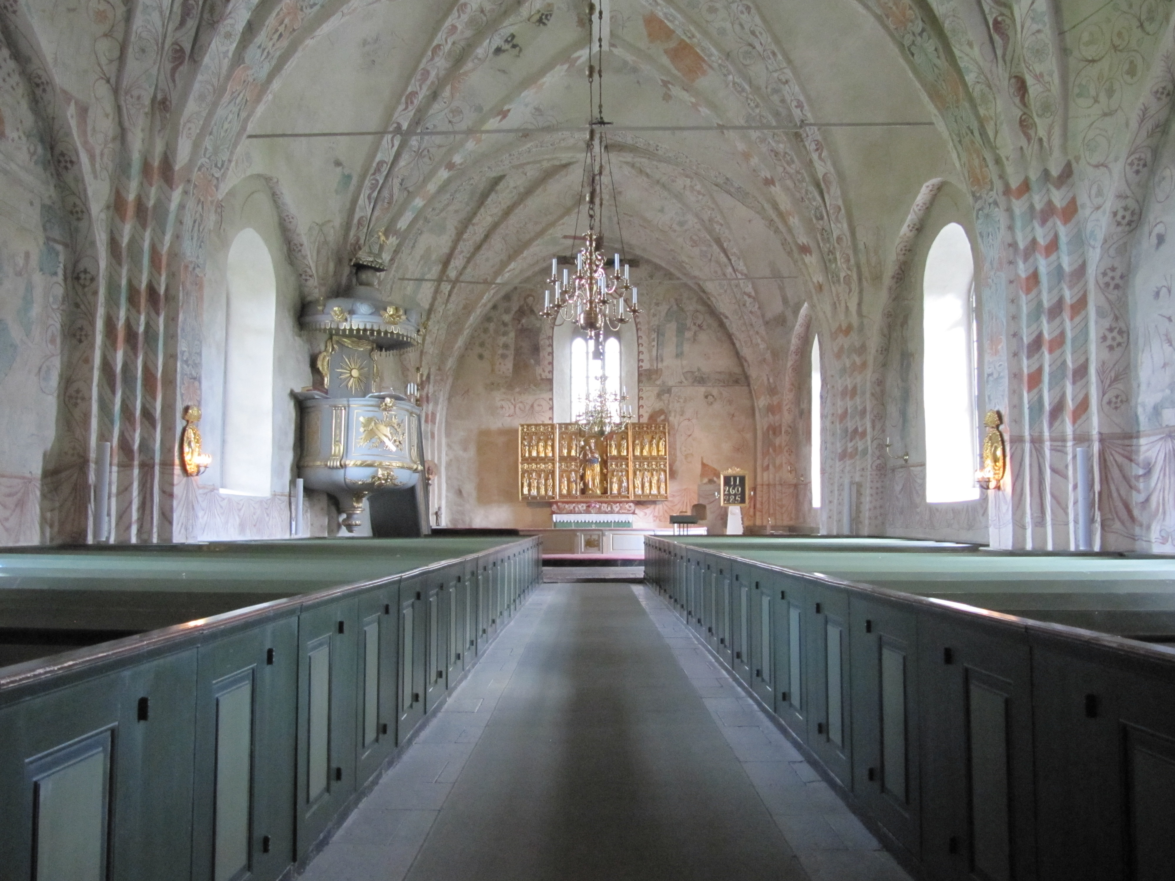 Kyrkorum i Litslena kyrka